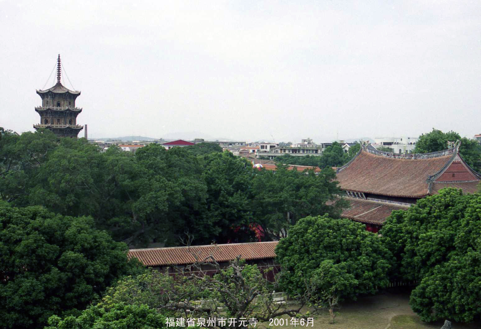 2001年泉州开元寺大雄宝殿以及仁寿塔（西塔）